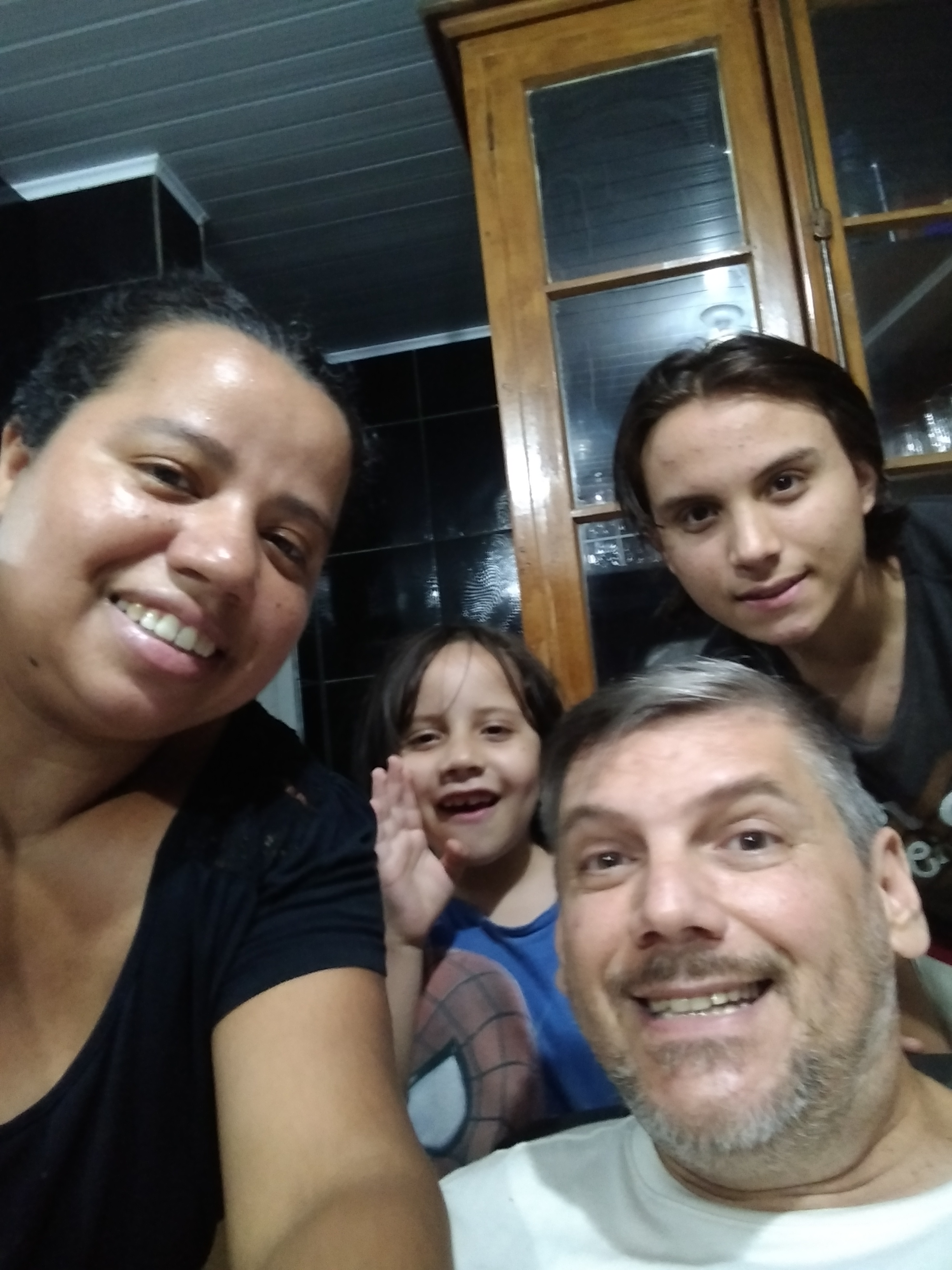 Final de ano.